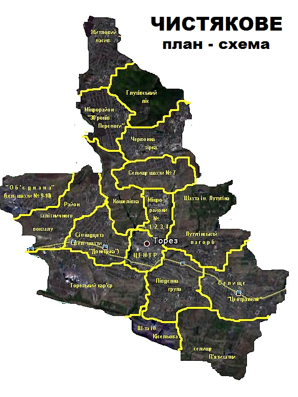 План-схема г. Чистяково